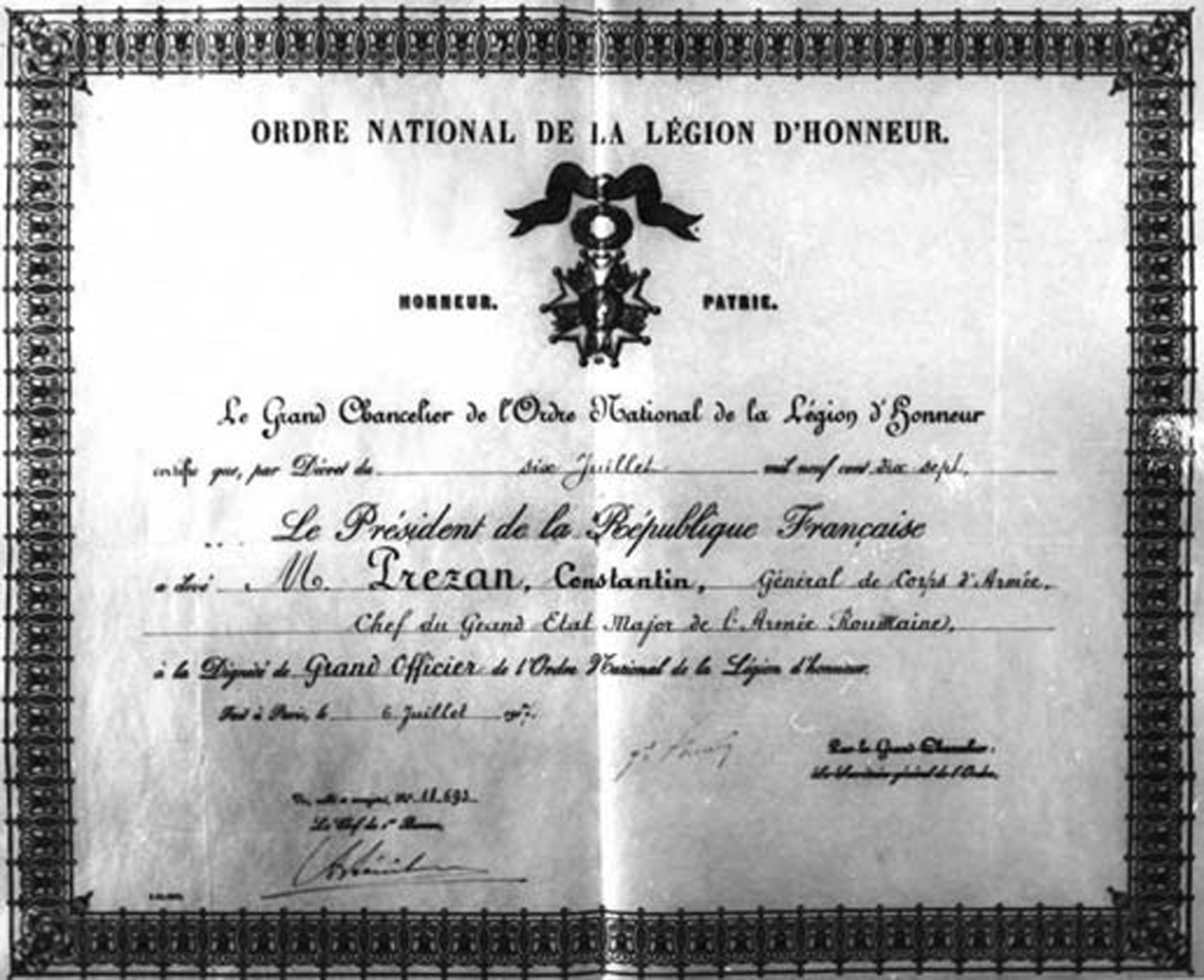 1917 -Constantin Prezan - Brevetul ordinului Legiunii de Onoare, Franţa Imaginea poate fi folosită fără restricţii fiind un document oficial al statului francez, nefiind protejată de drepturi de autor la data publicării